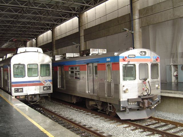 Linha F - CPTM - 1600/5500